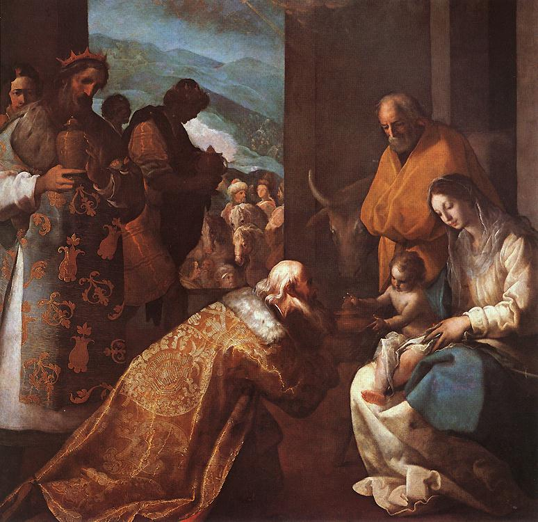 Adoración de los Reyes Magos, Museum of Fine Arts, Budapest